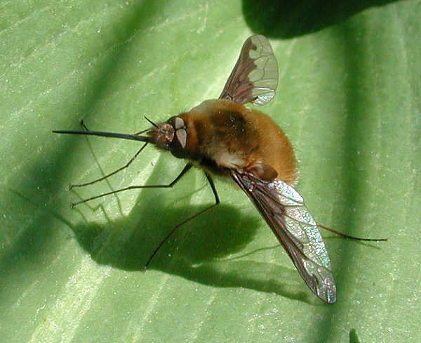 Bombylius major, Frankfurt, Deutschland